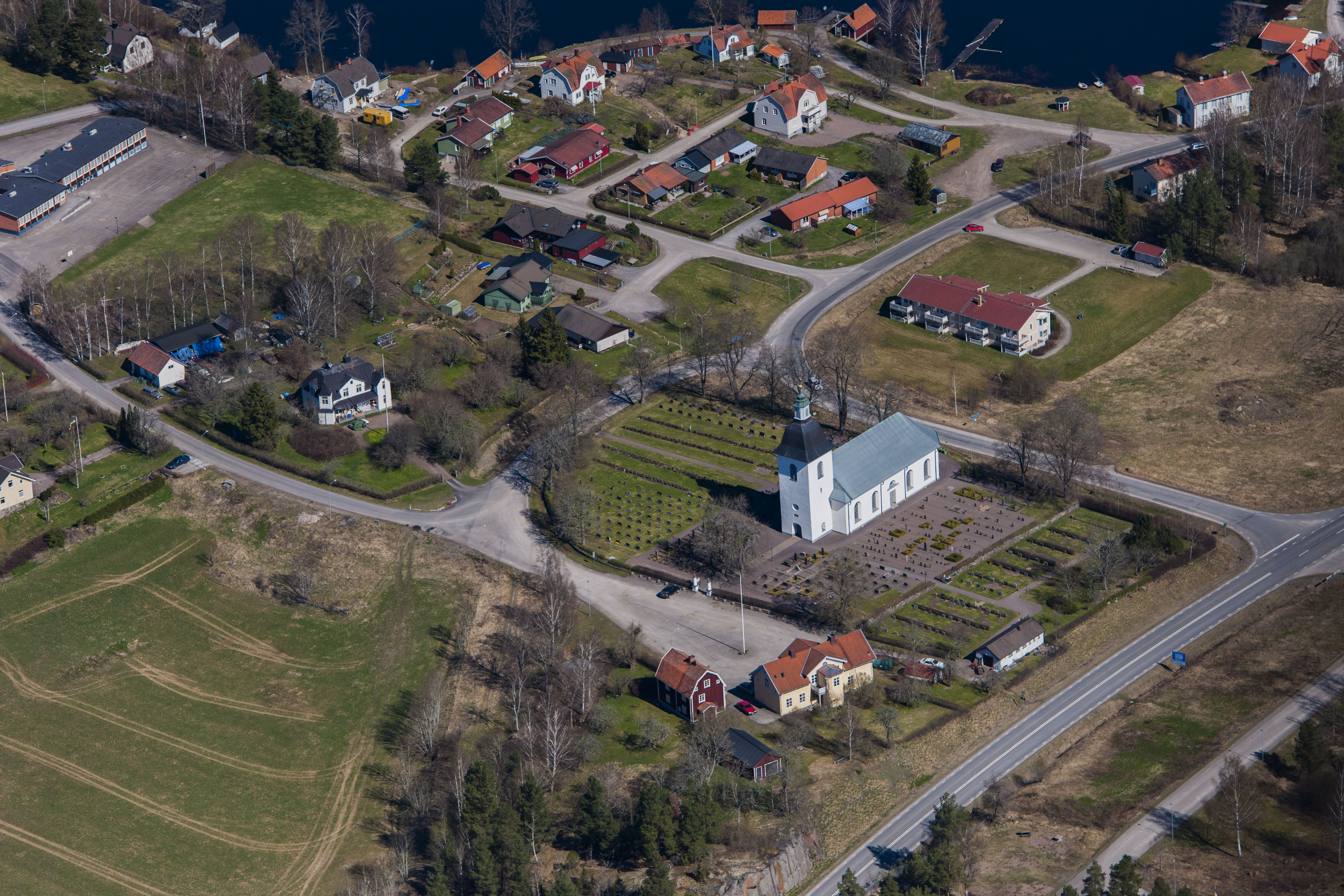 Hycklinge ka